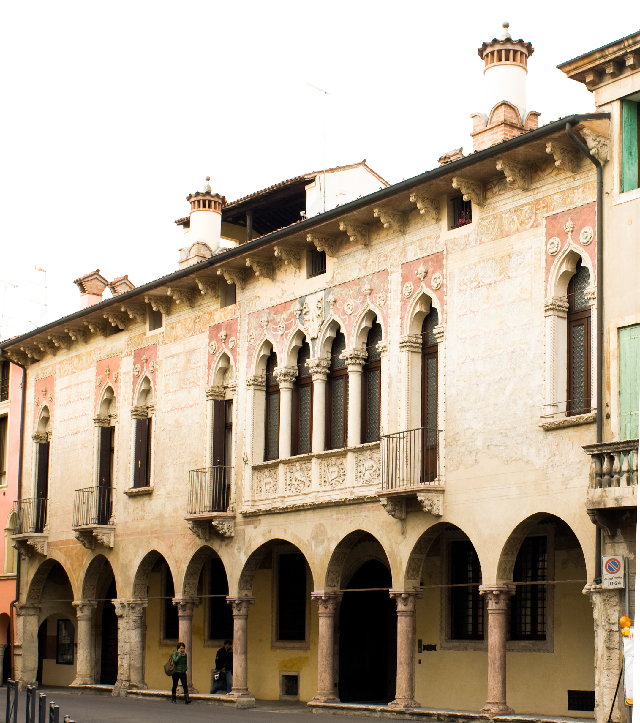 Palazzo Regaù - facciata in contrà XX Settembre